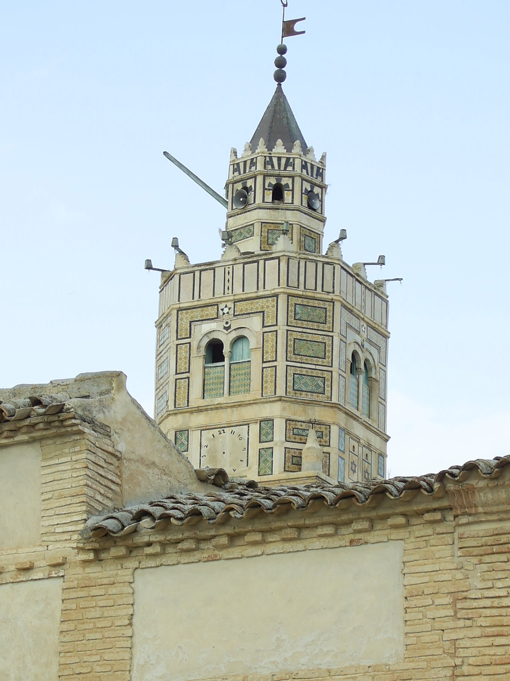 Grande mosquée, Testour